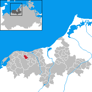 Steffenshagen in Mecklenburg-Western Pomerania - District Bad Doberan